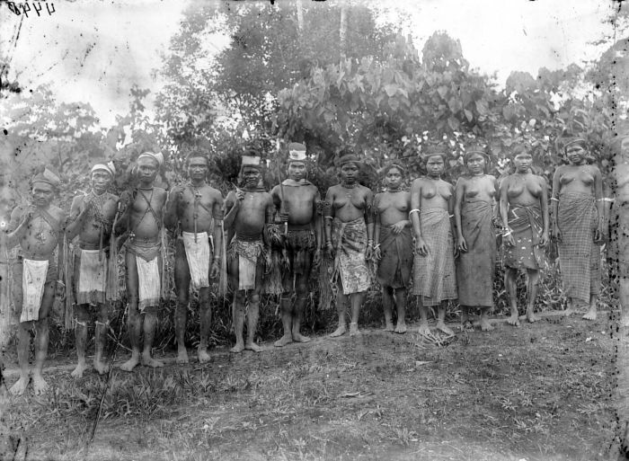 Negatief. Een groep mannen en vrouwen van Ahiolo Unknown language: W.Ceram. Mannen en vrouwen van Ahiolo.